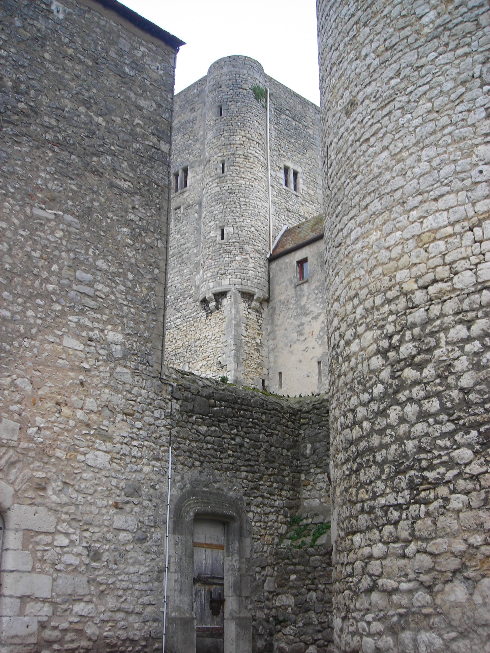 Château de Nemours